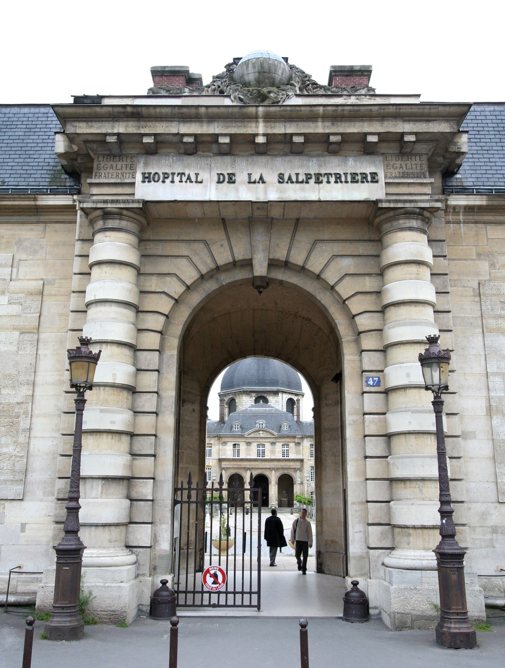 Hôpital de la Salpêtrière